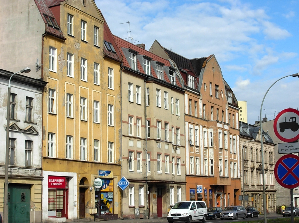 Ulica Grunwaldzka w Bydgoszczy